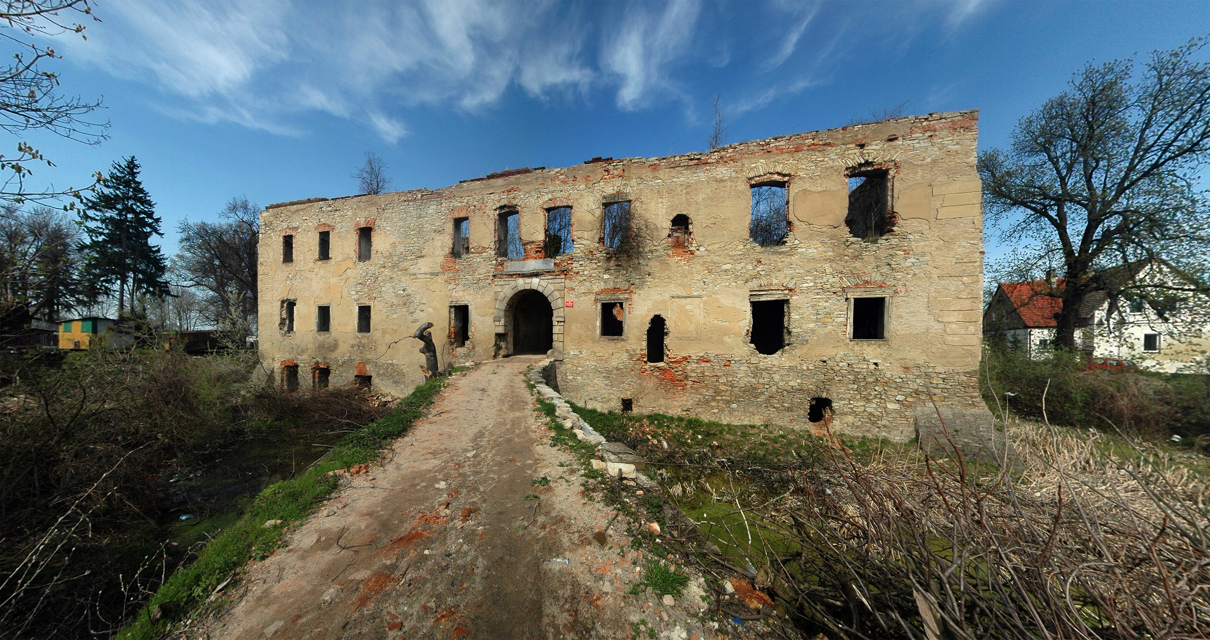 Prusy - zespół dworski, 1608, XVIII w.: ruina dworu (zabytek nr 223 z 23.04.1951)